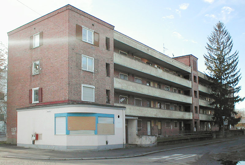 Laubenganghaus in der Olgastraße 84 (früher Kornacherstr. 1) in Heilbronn. Das Gebäude gilt als Prototyp moderner Mietshäuser.